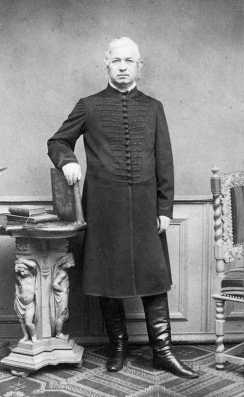 Székács József (1809–1876) evangélikus püspök, költő, műfordító, egyházi író, a Magyar Tudományos Akadémia levelező, majd tiszteleti tagja portréja